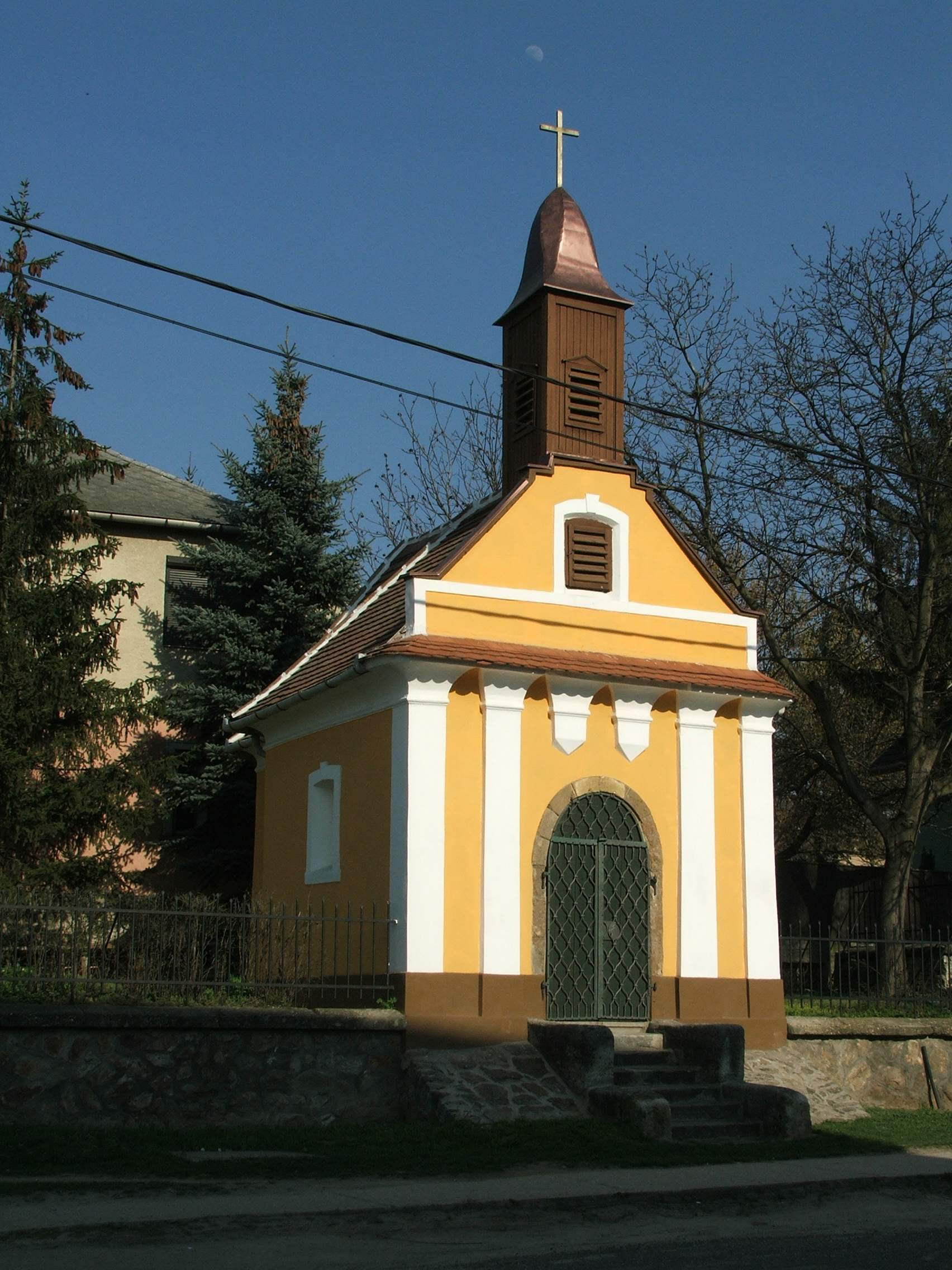 Rozália-kápolna, Esztergom